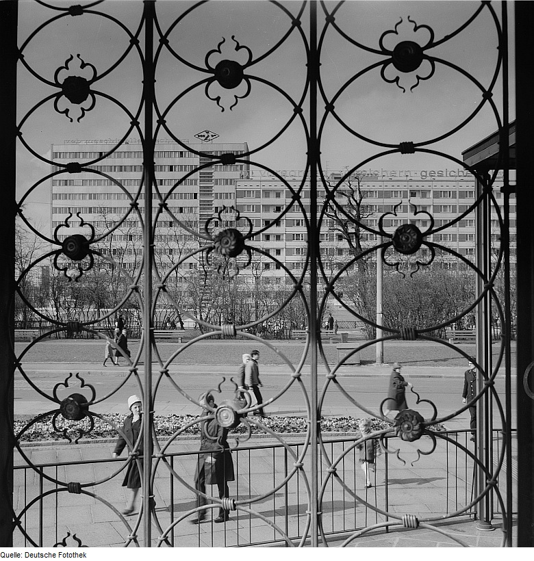 Original image description from the Deutsche FotothekDresden. Blick vom Ringcafé gegen Bebauung Dr.-Otto-Nuschke-Straße